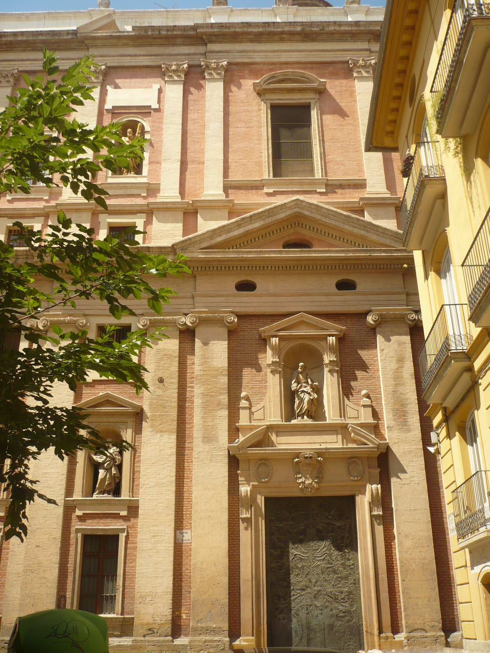 Puerta Principal Iglesia de las Escuelas Pías de la calle carniceros de Valencia.